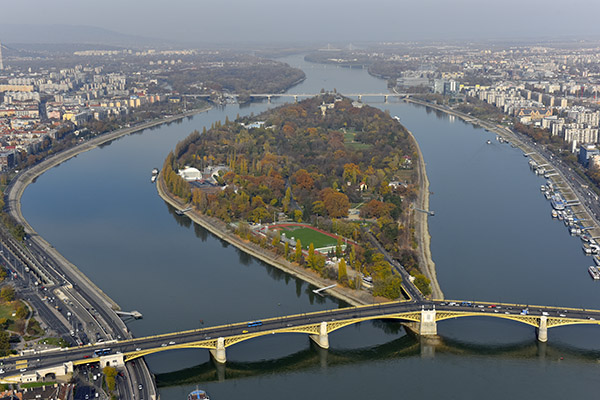 Margitsziget 2018-ban - légi fotó